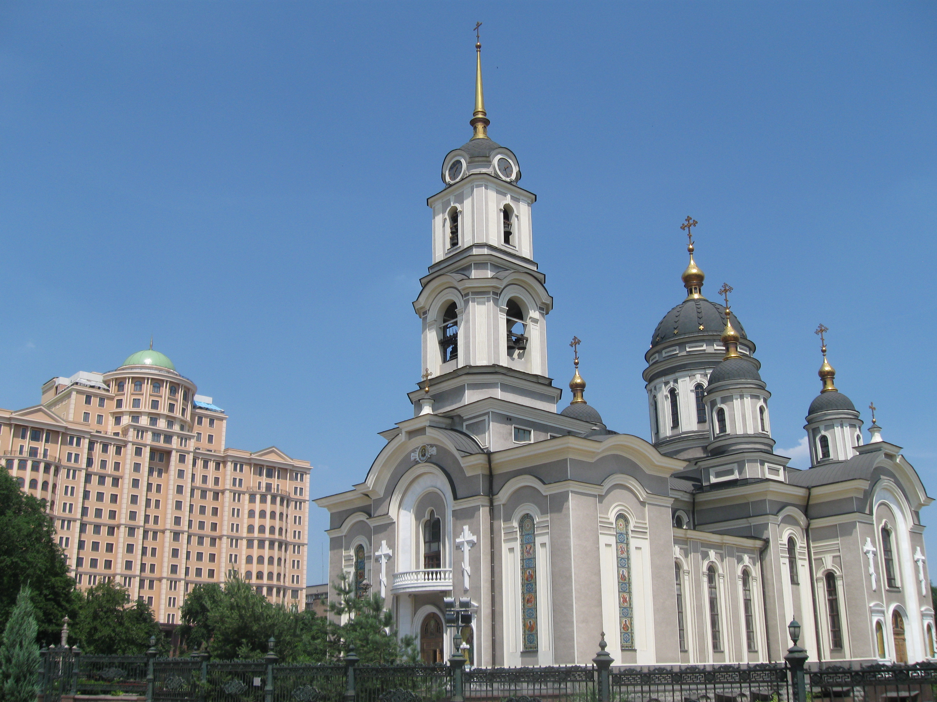 Свято-Преображенский собор